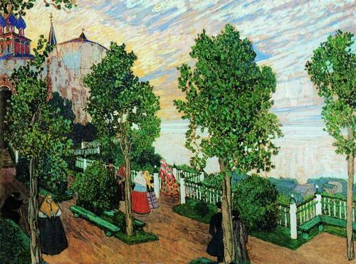 Берег Волги. 1916 Эскизы декораций к драме А.Н. Островского "Гроза" Картон, темпера. 70 x 104 см Государственный центральный театральный музей им. А.А.Бахрушина